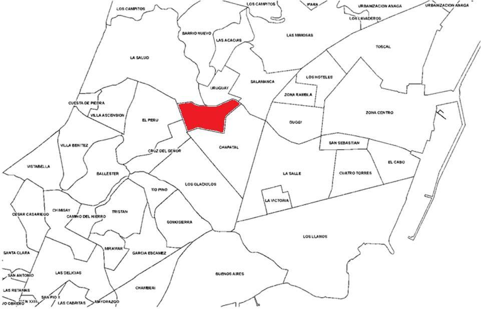 Localización del barrio de Buenavista